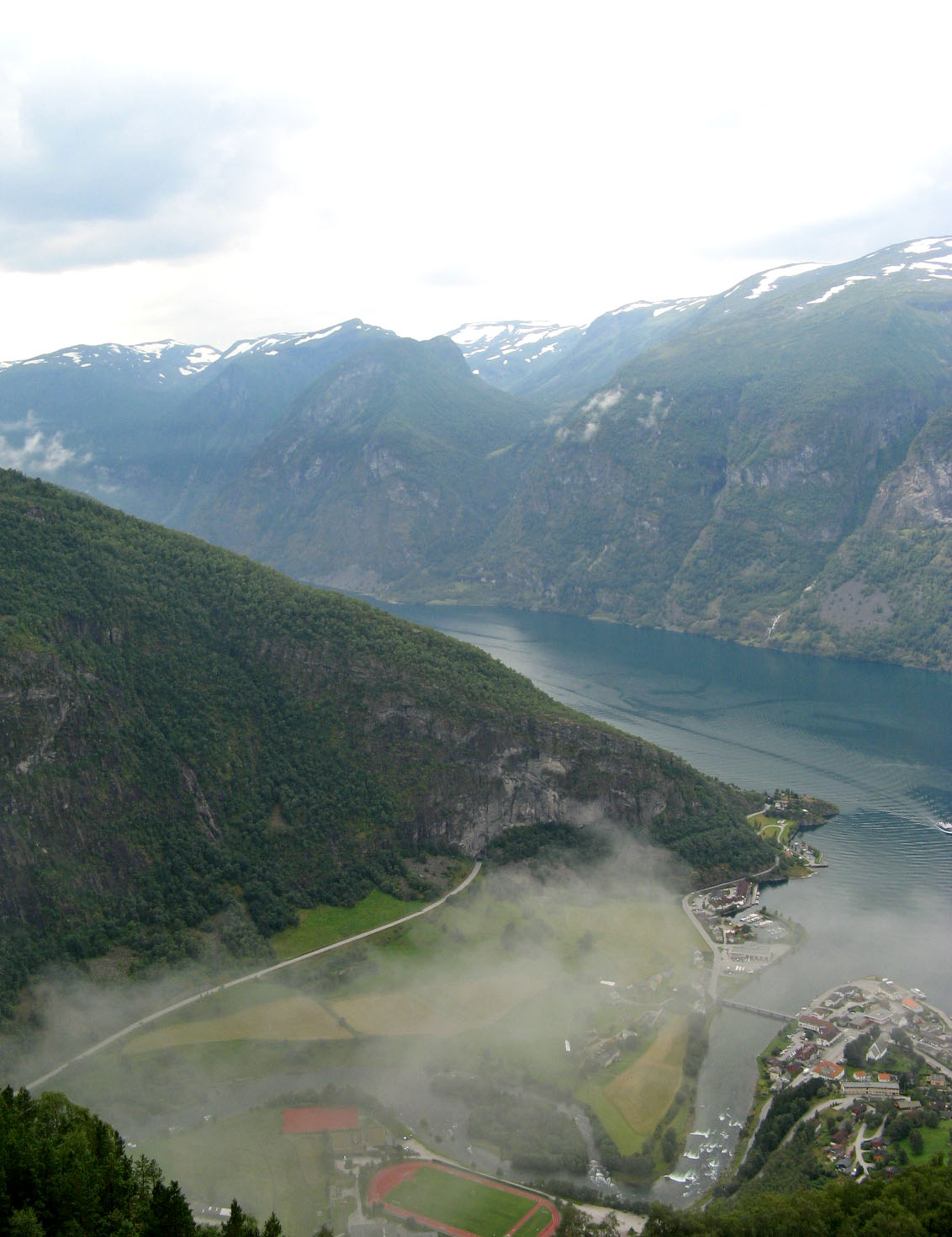 Aurlandsvangen and Aurlandsfjorden seen from Snøvegen